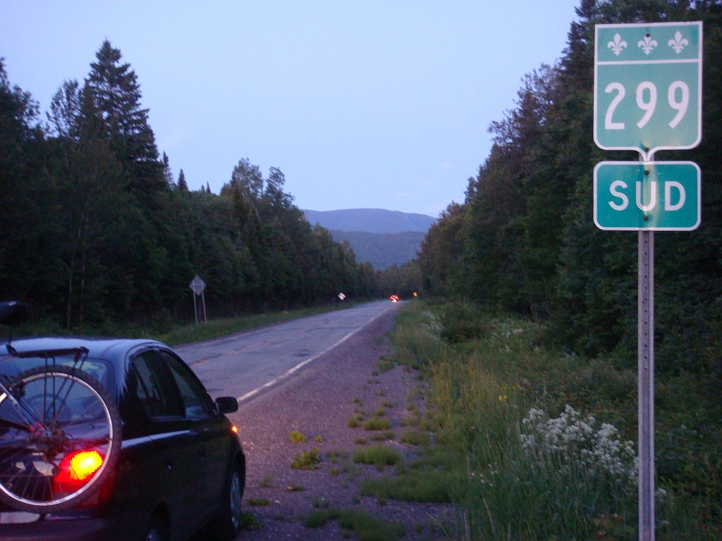 Photo de la route 299, dans le parc provincial de la Gaspésie, Québec, Canada.